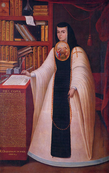 Retrato de Sor Juana Inés de la Cruz (1648-1695), ”copia fiel” siglo XVIII